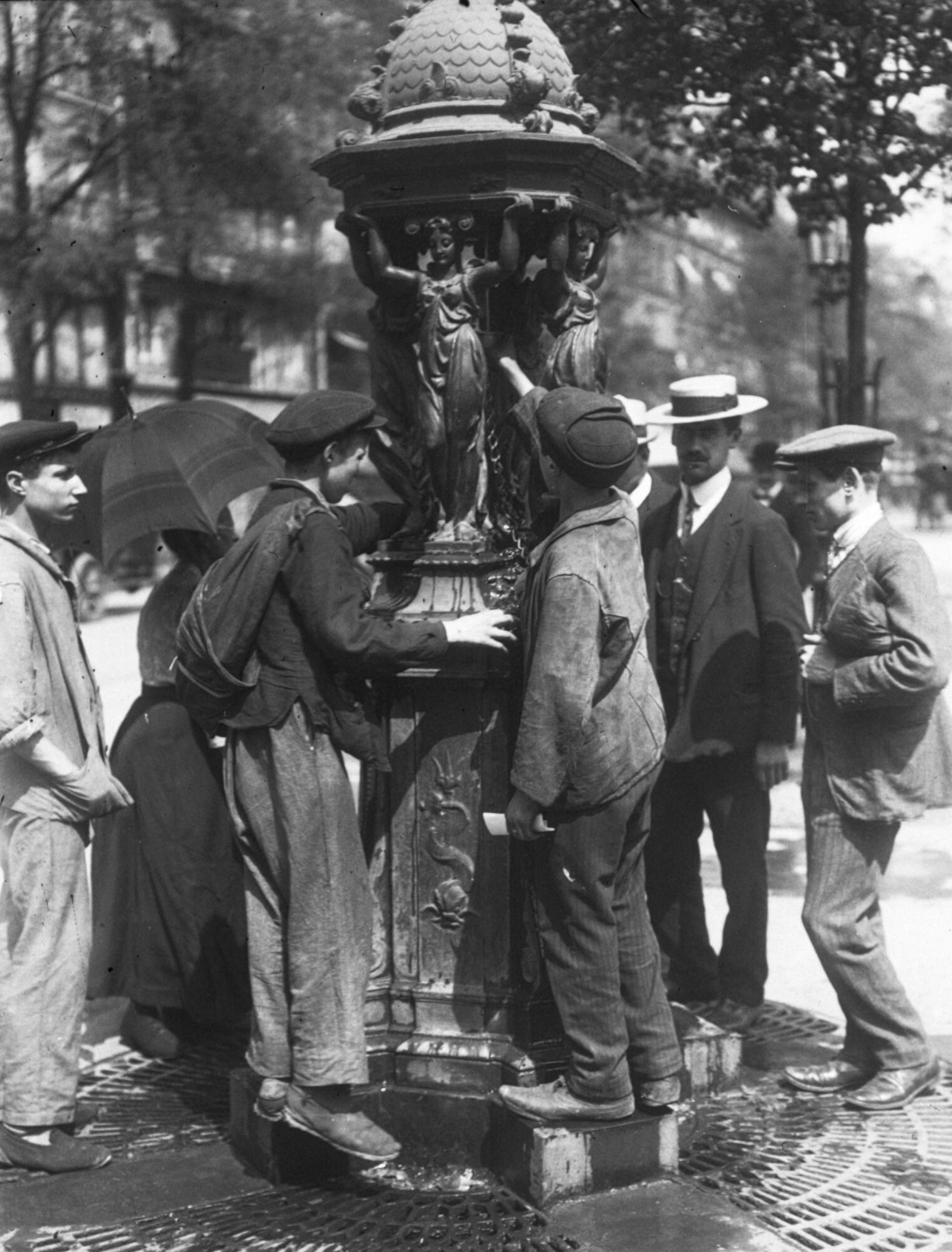 Personnes se désaltèrant à une fontaine Wallace à Paris lors de la revue du 14 juillet 1911